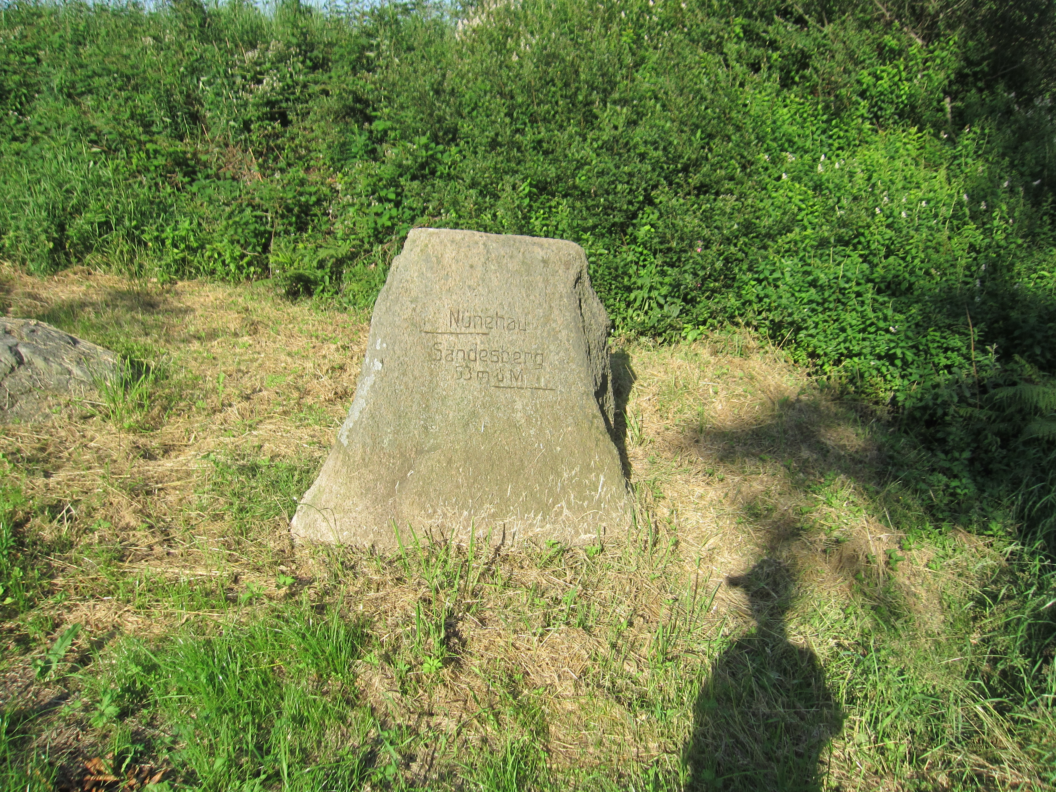 Stein Nünehau Sandesberg in Ostenfeld